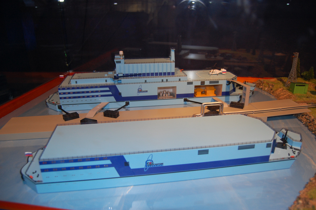 Maqueta central nuclear flotante